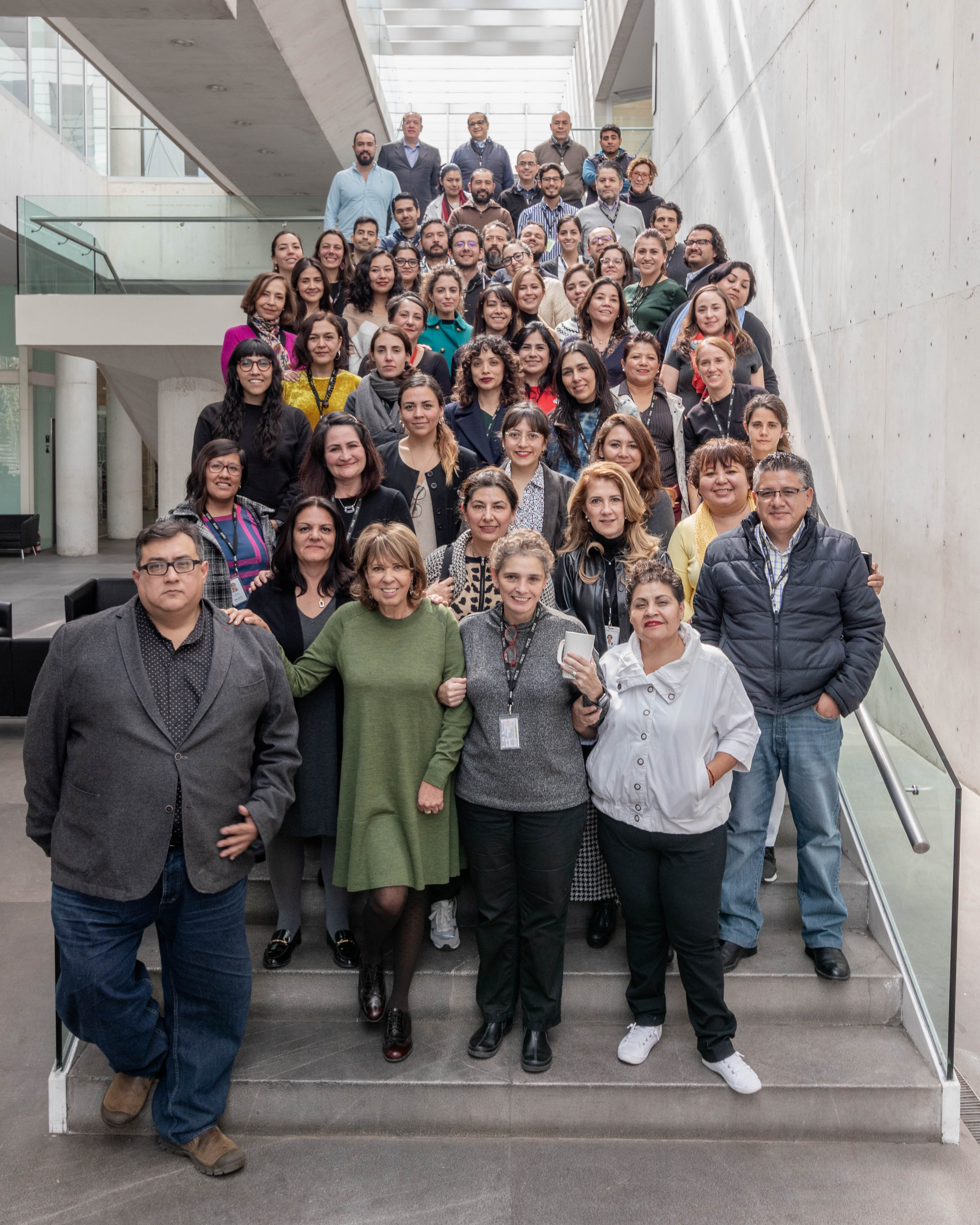 Graciela de la Torre y su equipo en el Museo Universitario Arte Contemporáneo (MUAC)